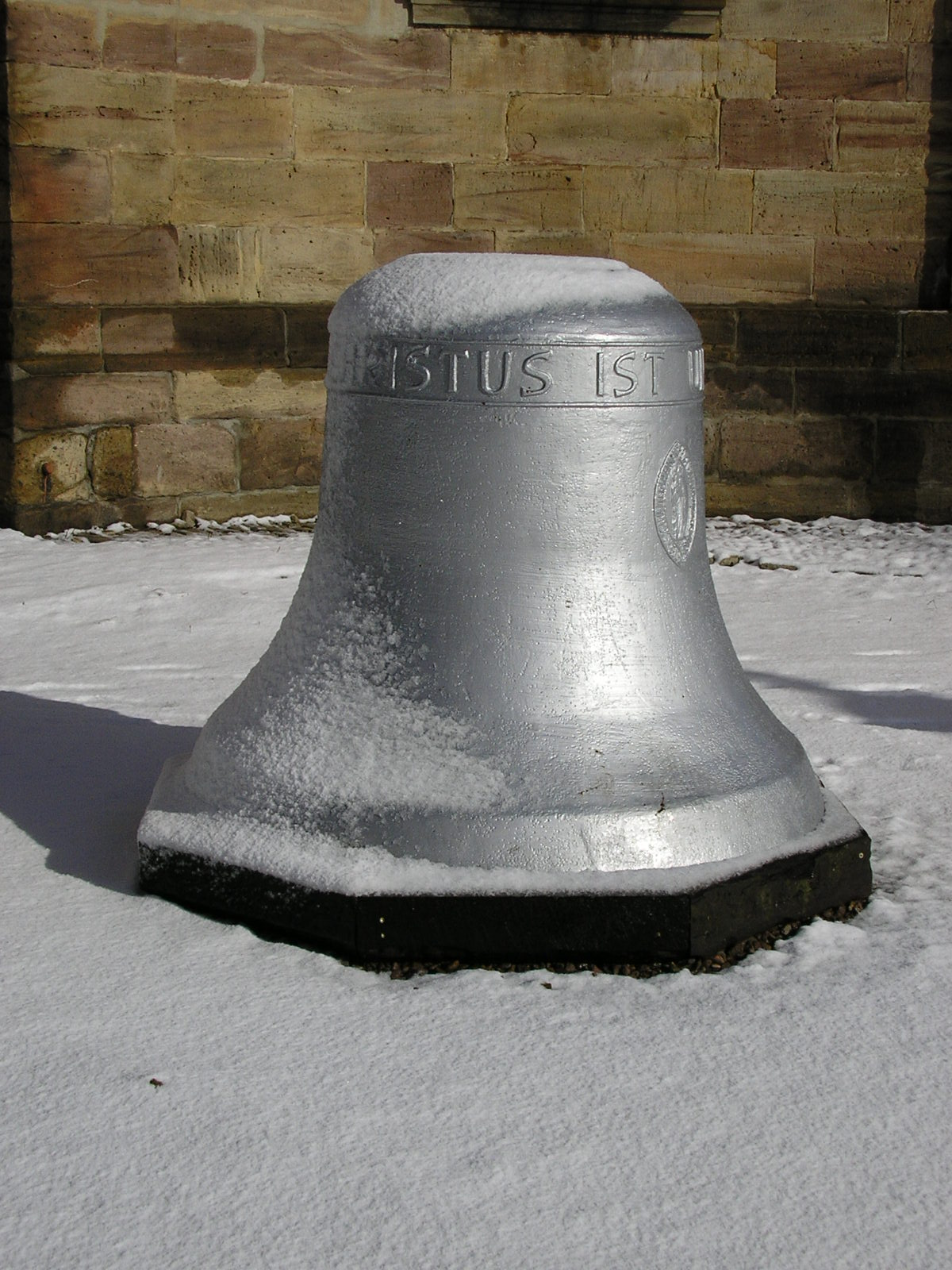 Dies ist die alte Glocke der Waltershäuser Stadtkirche.